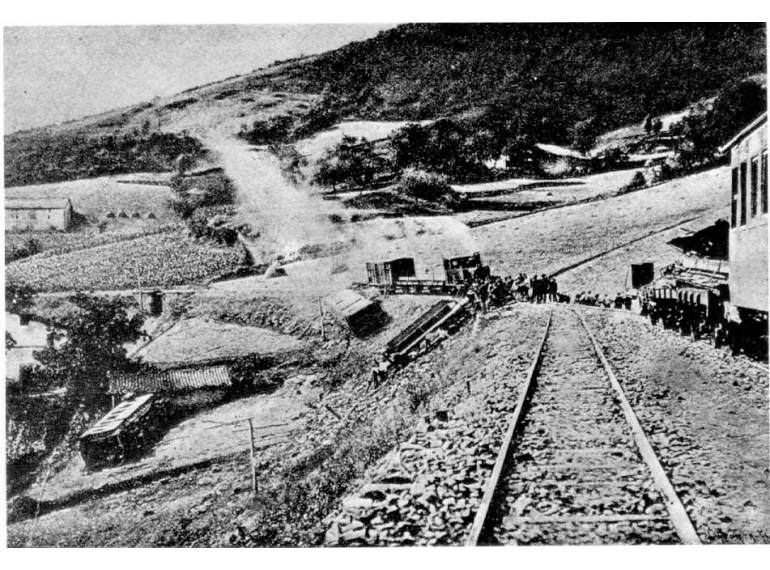 Debako trena edo Durango-Zumarraga burdinbidea, Antzuolan